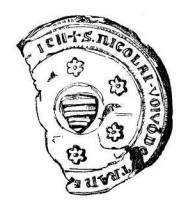 Pok nb. Miklós erdélyi vajda pecsétje 1277-ből